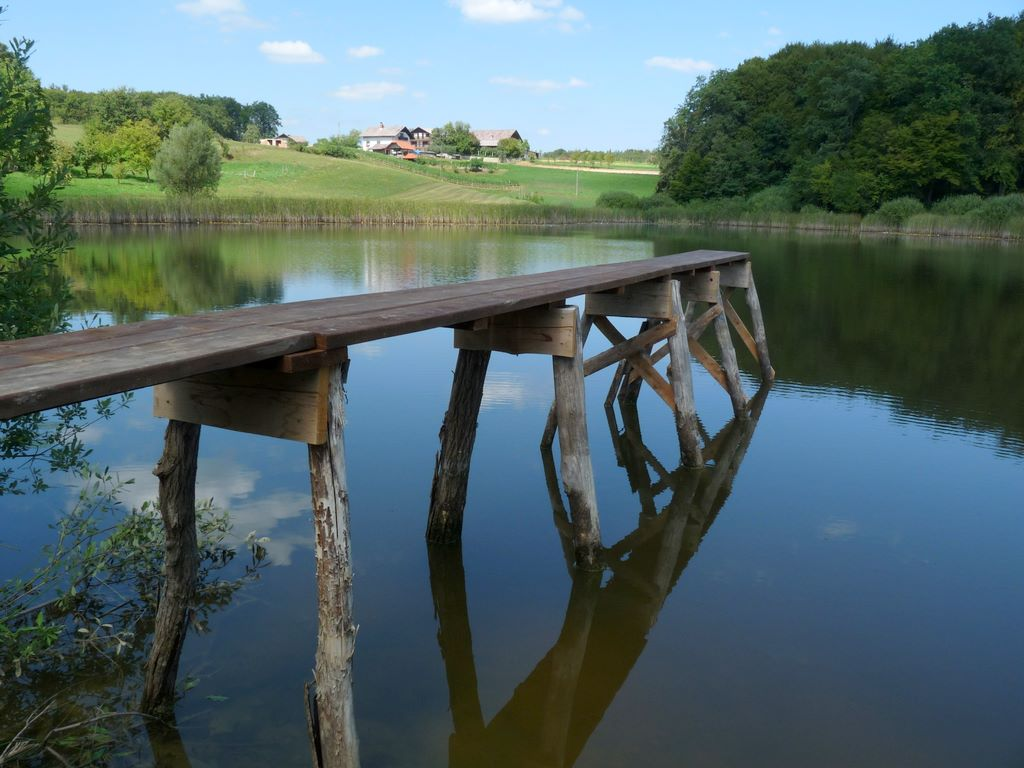 Štritovsko jezero